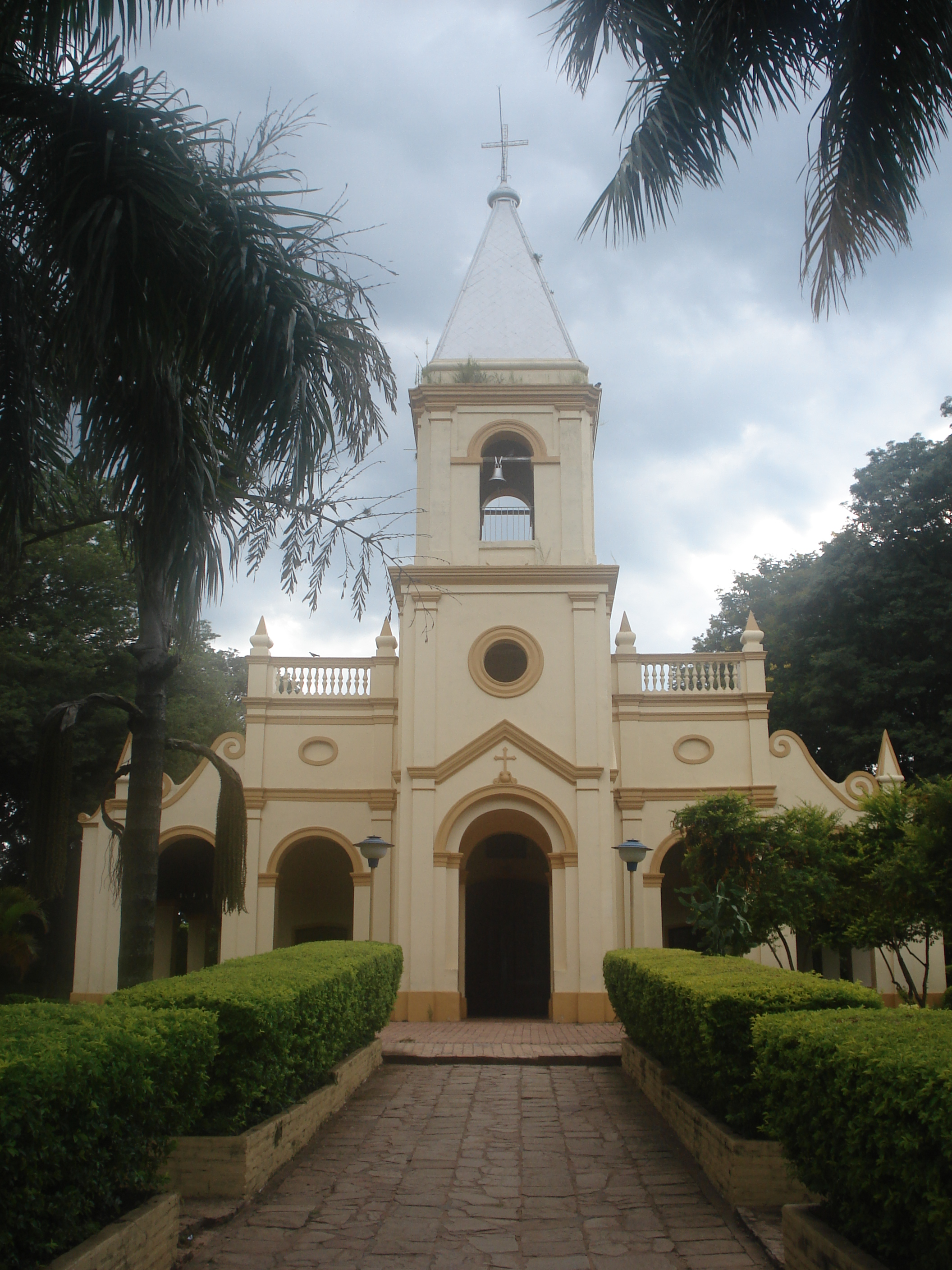 iglesia